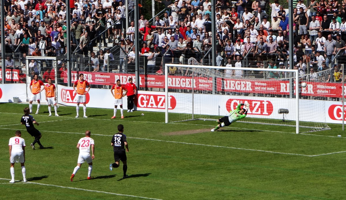 Martin Dausch gegen Andre Weis am 28.04.2012. Aalen steigt durch den Treffer zum 2:1 (Endstand 2:2) in die 2. Bundesliga auf. Aufgenommen von